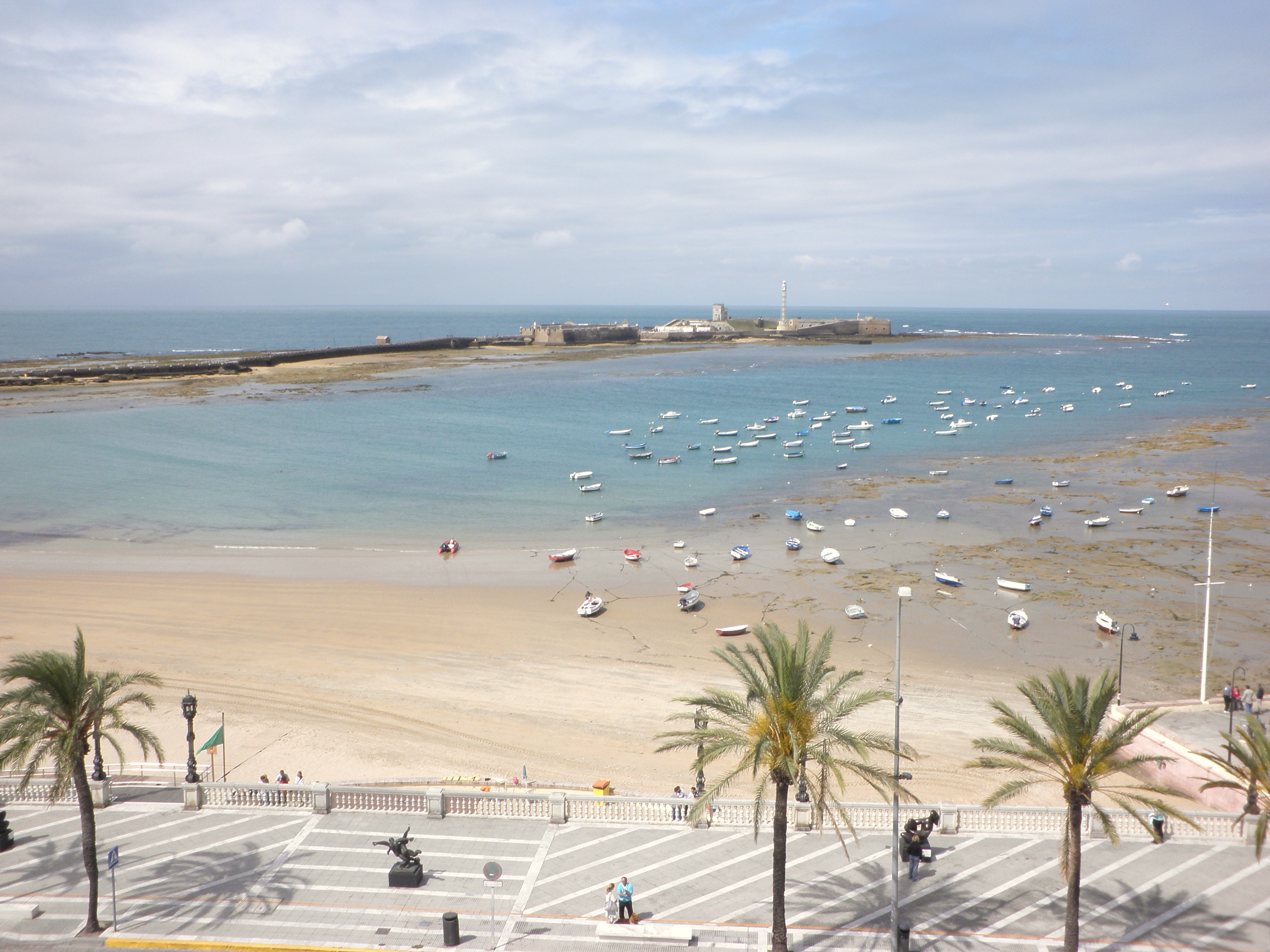 Playa de La Caleta desde azotea, Cádiz, España.